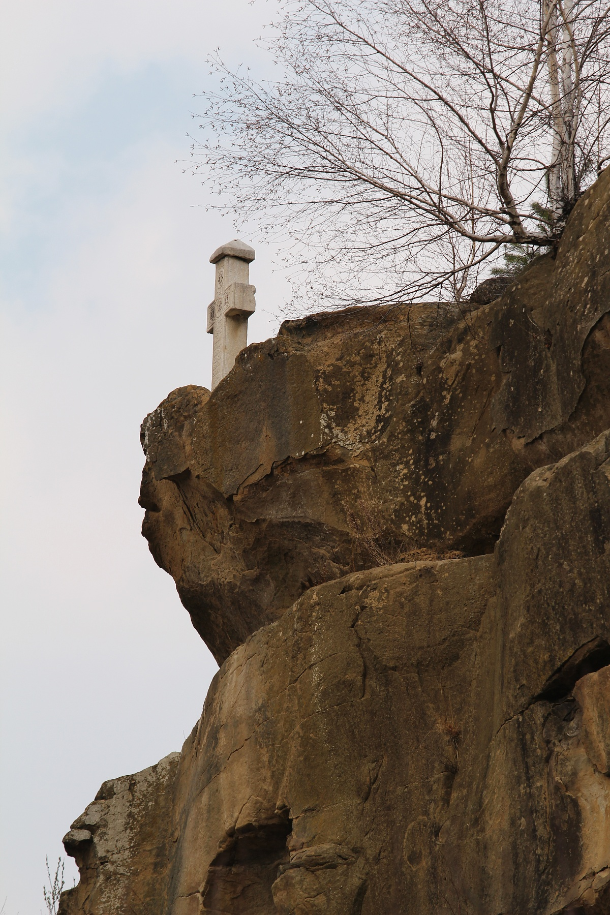 Stânca schitului "Sf. Apostoli" - Jgheaburi: cruce de piatră